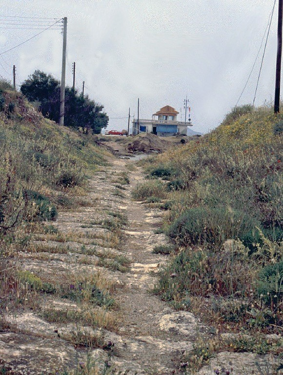 Der Pfad, auf dem die Schiffe geschleift wurden